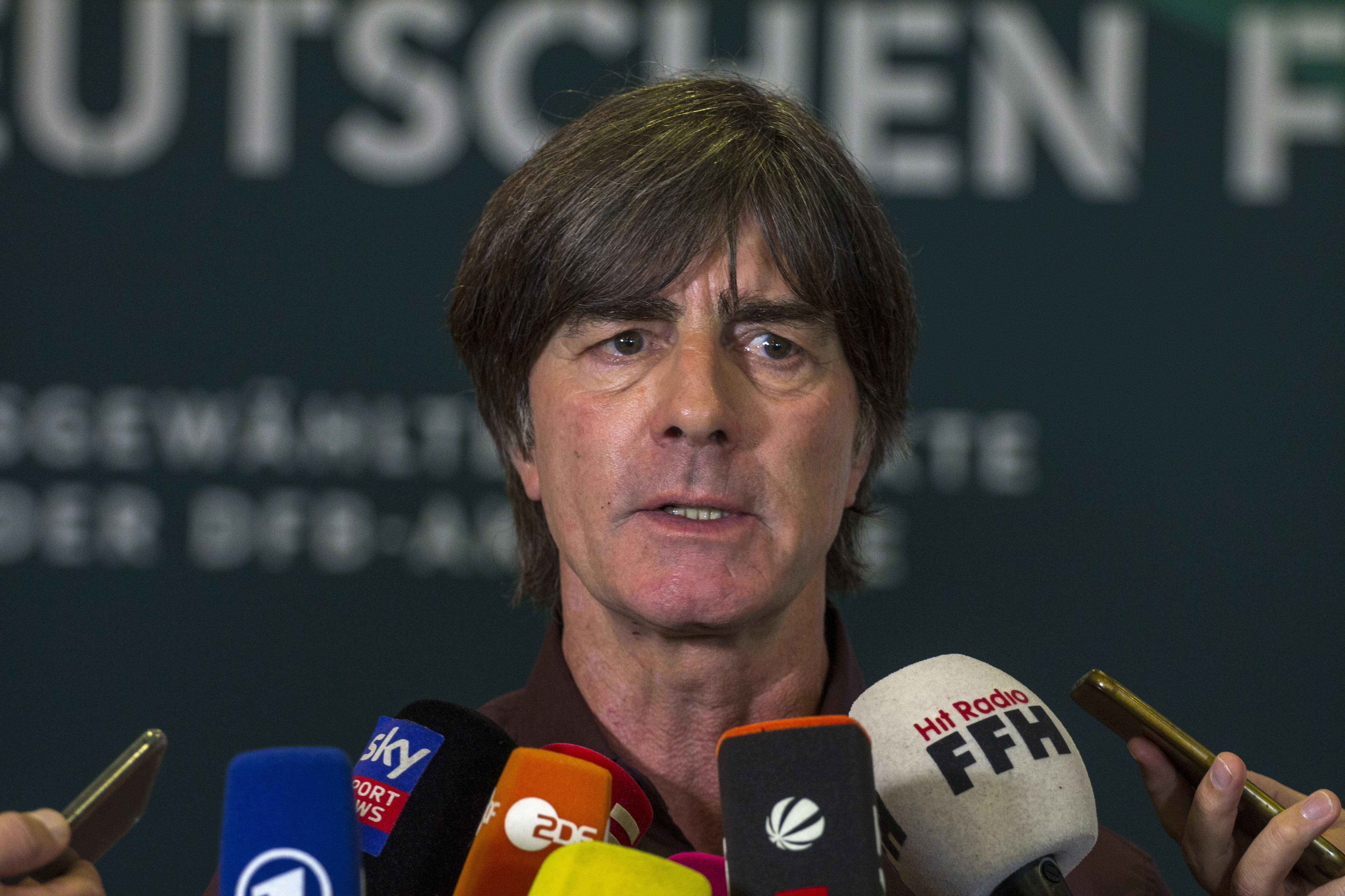 Joachim Löw am 27. September 2019 beim DFB Bundestag in Frankfurt am Main.